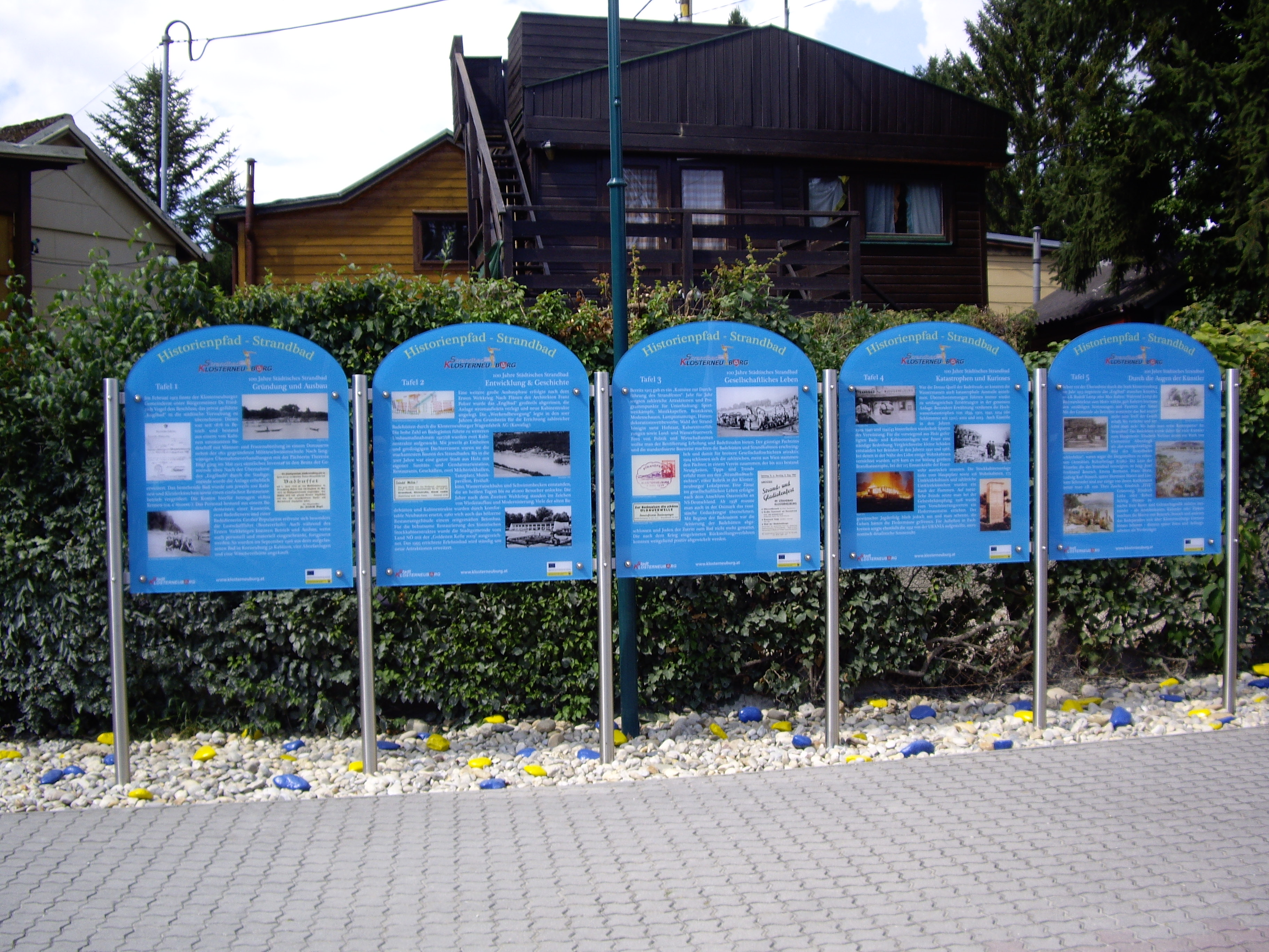 Pado de Historioj - Strandbanejo Klostronovburgo: 5 tabuloj